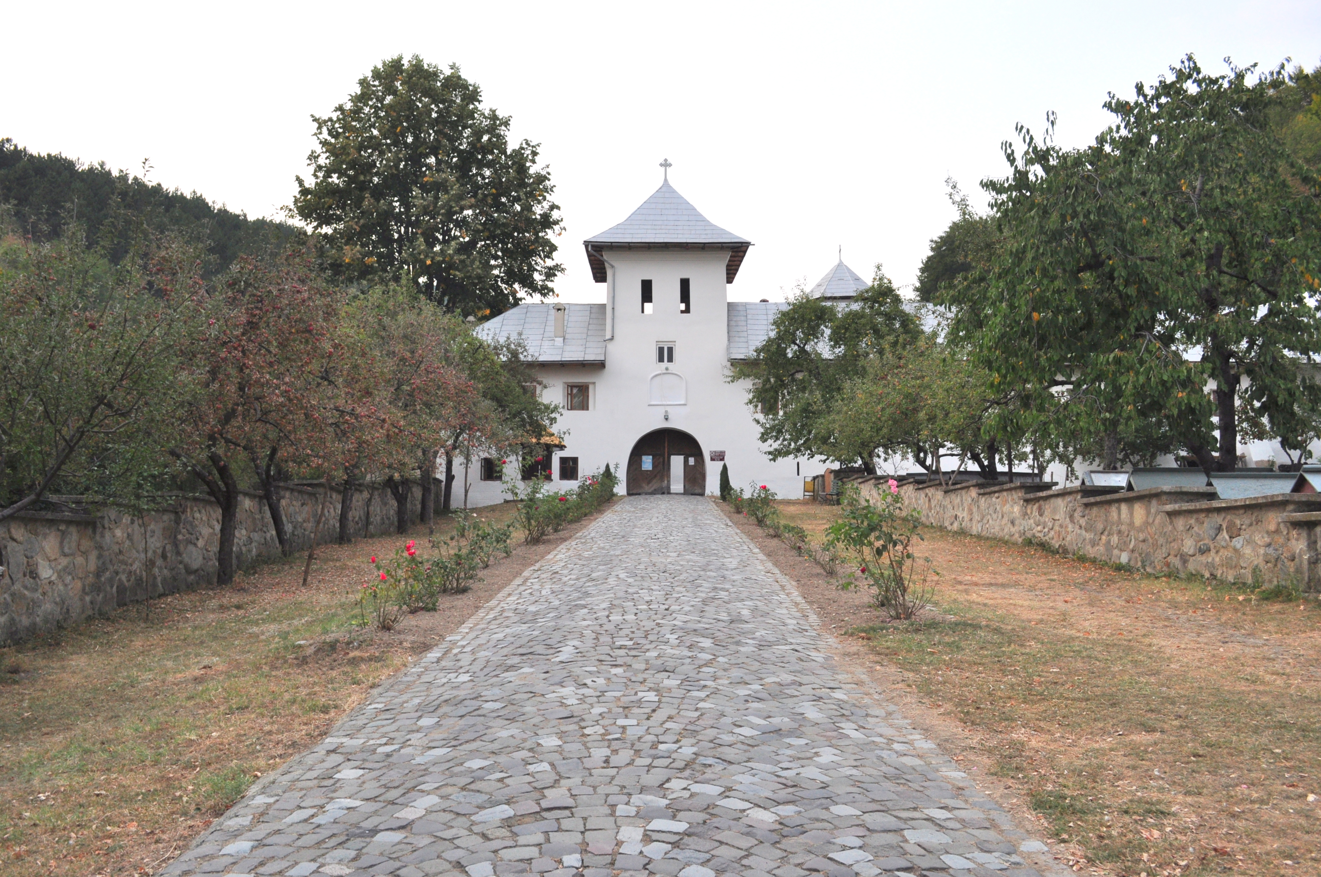 Ansamblul schitului Crasna, județul Gorj